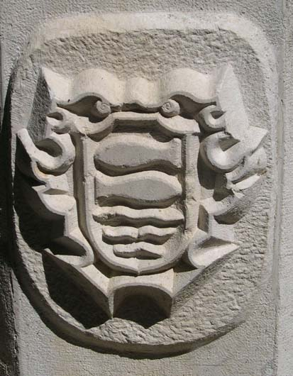 Detalle del escudo del municipio de Viver, Alto Palancia, Comunidad Valenciana